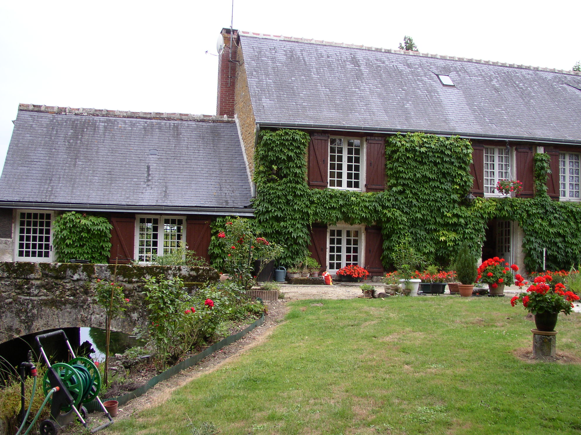 Façade du Mouline de Moncey Photo JF Lallery Propriétaire du Moulin